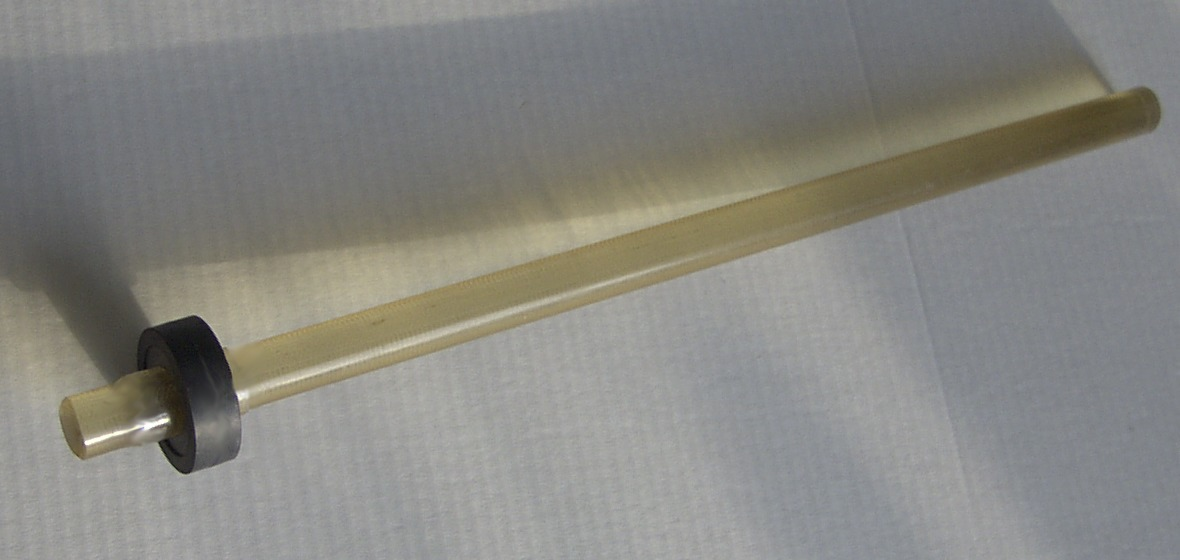 Röhrenabklopfhammer